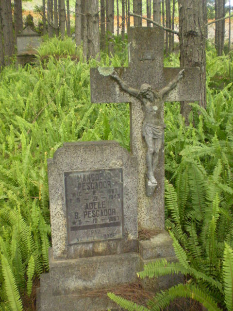 Foto do cemitério de Azambuja